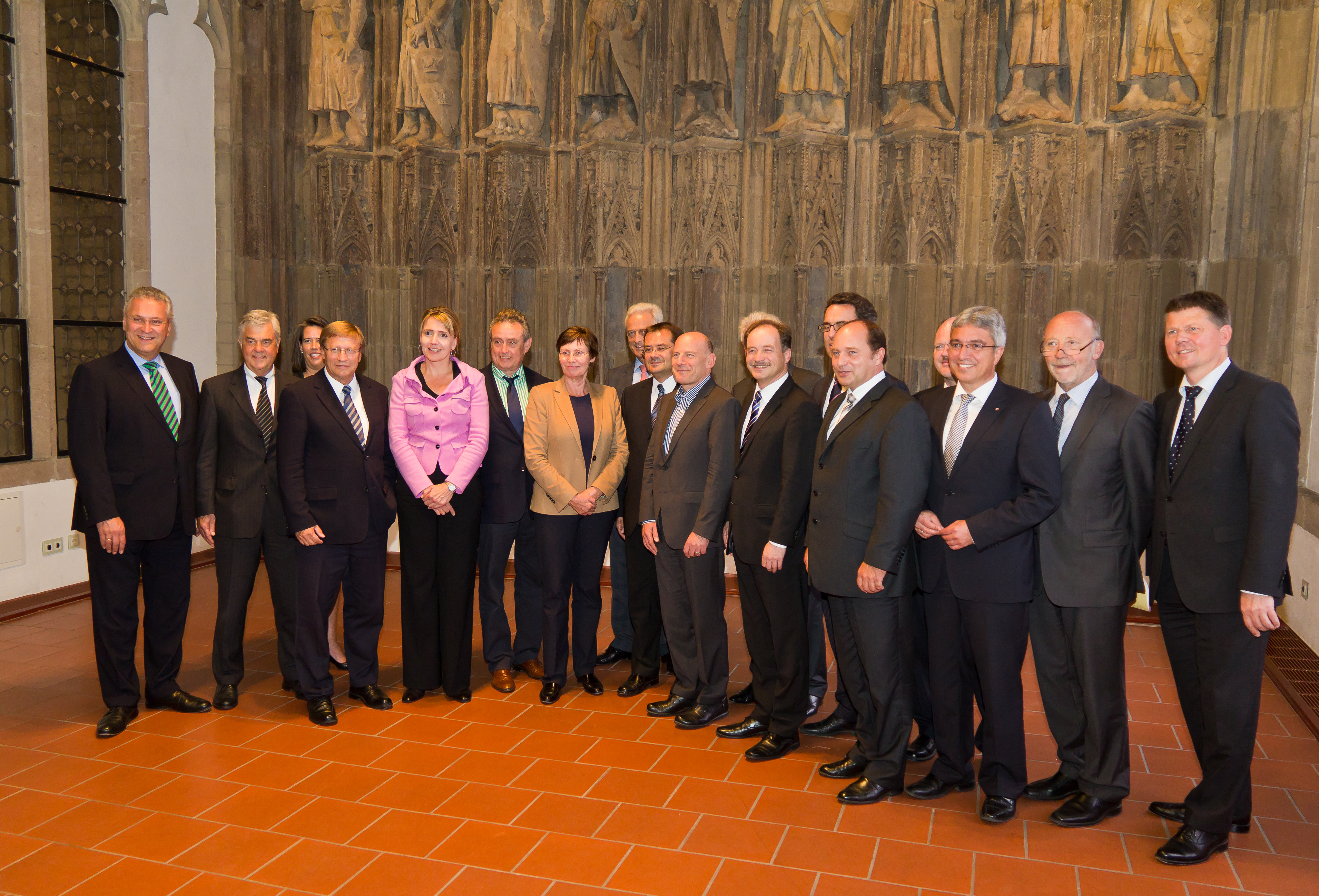 Verkehrsministerkonferenz September 2011 in Köln. Gruppenfoto im Hansasaal des Historischen Rathauses von Köln.